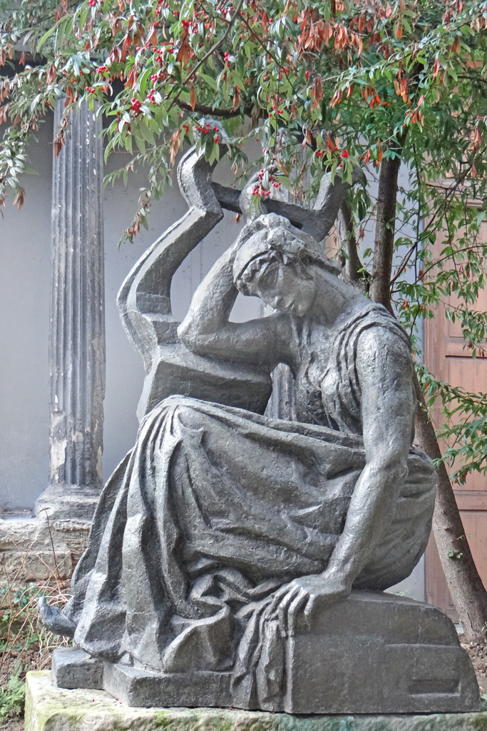 Древнегреческая женщина